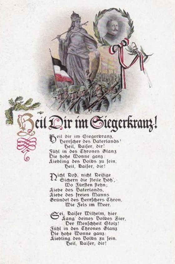 Heil dir im Siegerkranz, Postkarte um 1900